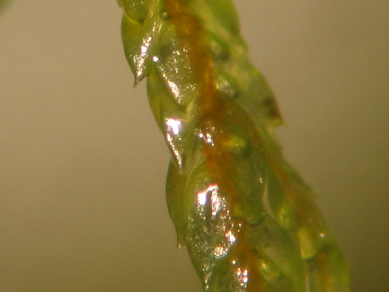 Etagenmoos Hylocomium splendens, Rostock